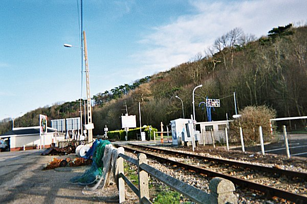 Port de Dives-sur-Mer, Dives-sur-Mer.